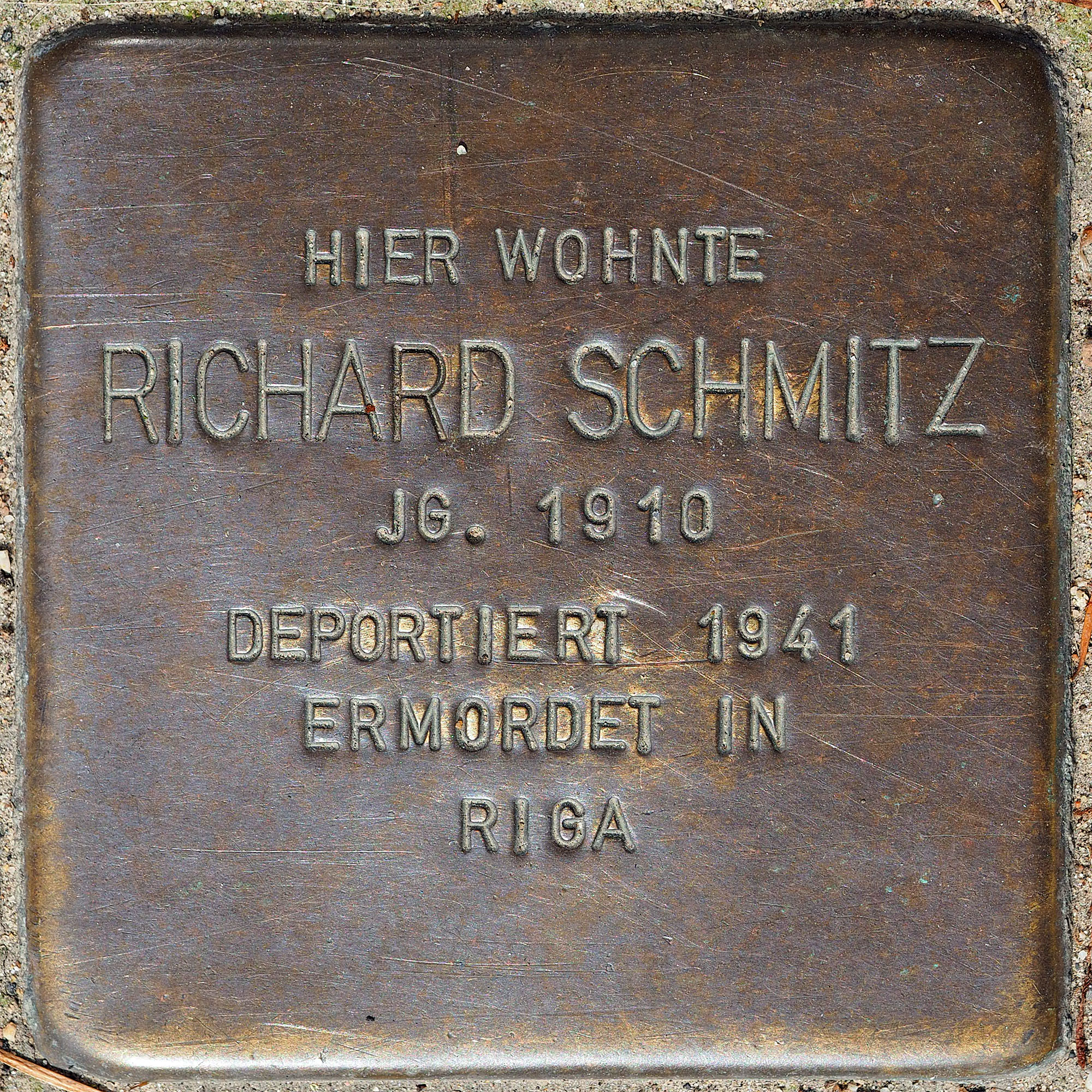 Stolpersteine GV: Schmitz, Richard